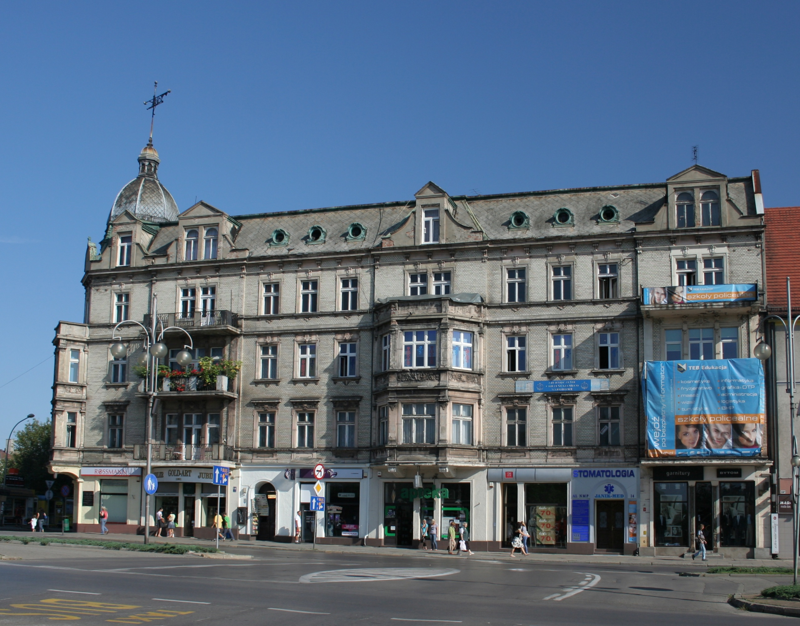 Dom Adolfa Frankego w Częstochowie.